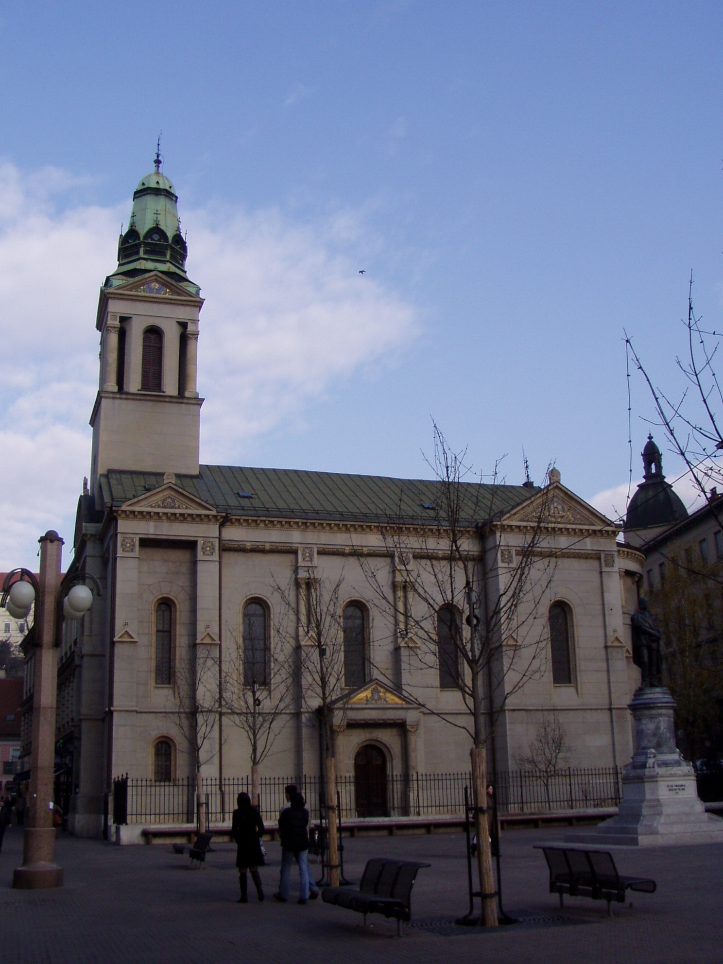 Собор Преображения Христова в Загребе